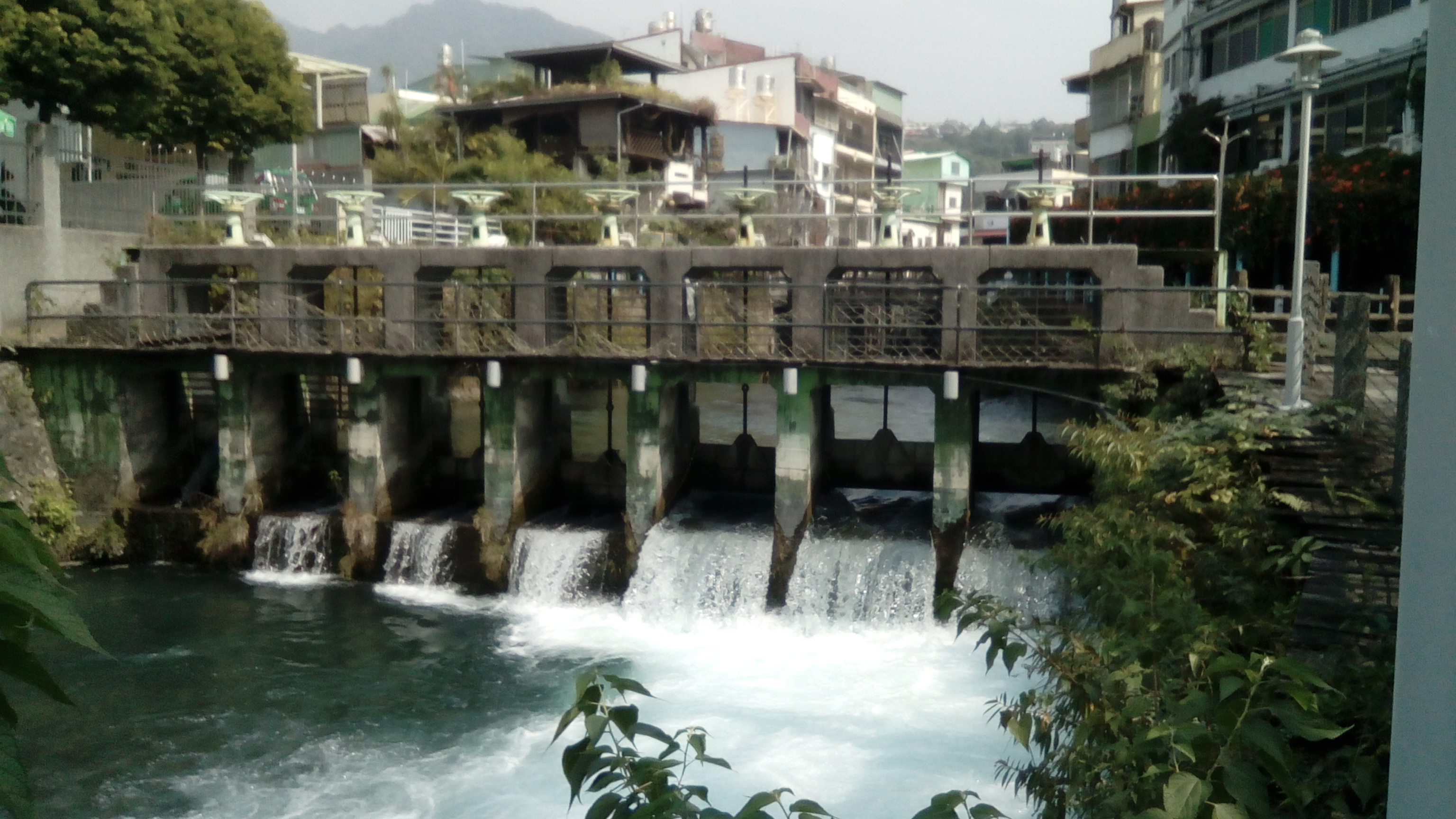 同上